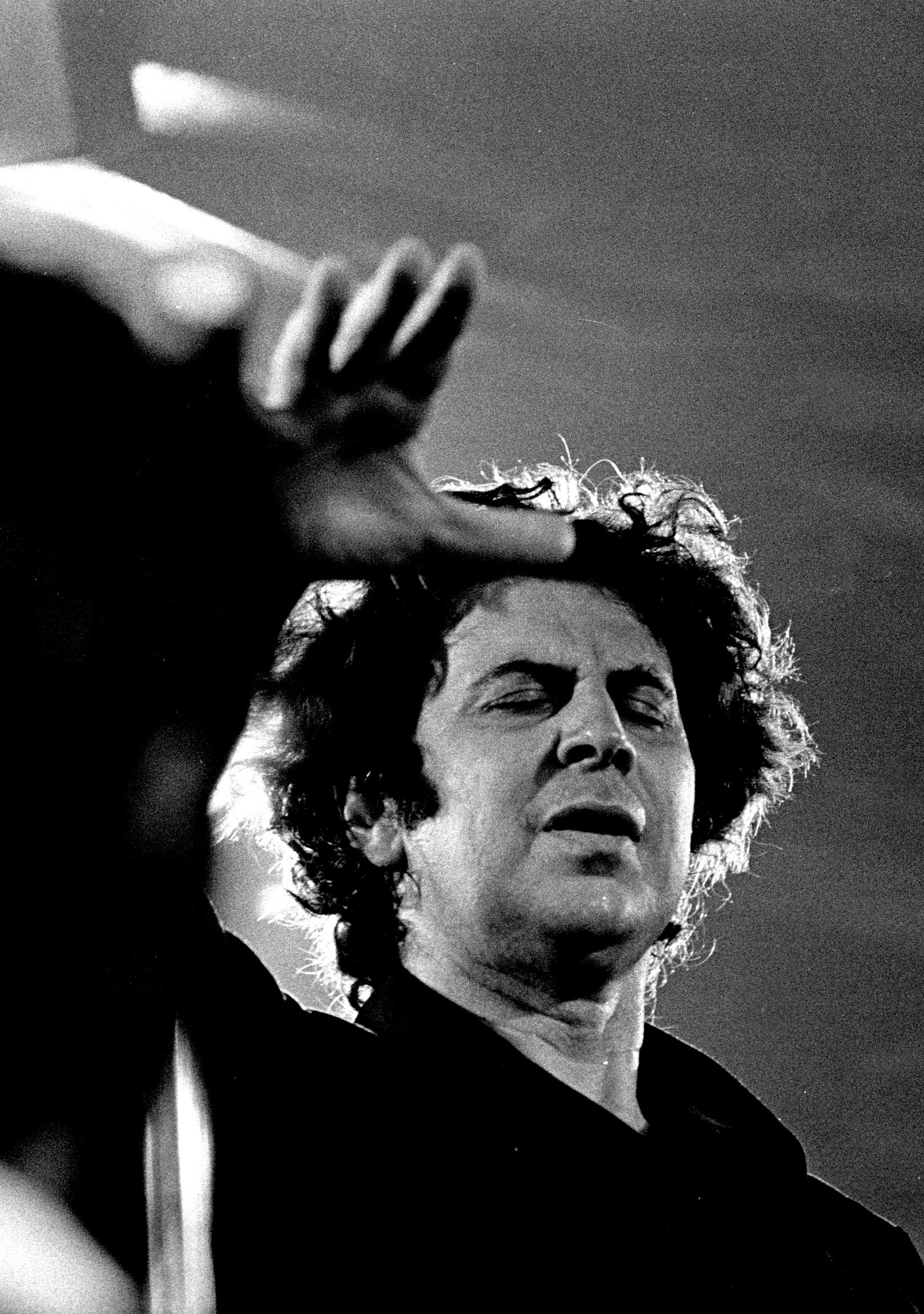 Mikis Theodorakis, "Fabrik" Hamburg, 1971